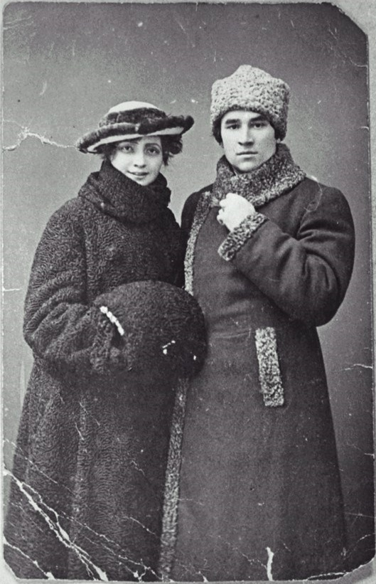 Mirsaid Sultangaliyev ve eşi Fatma Erzin Moskova 1919